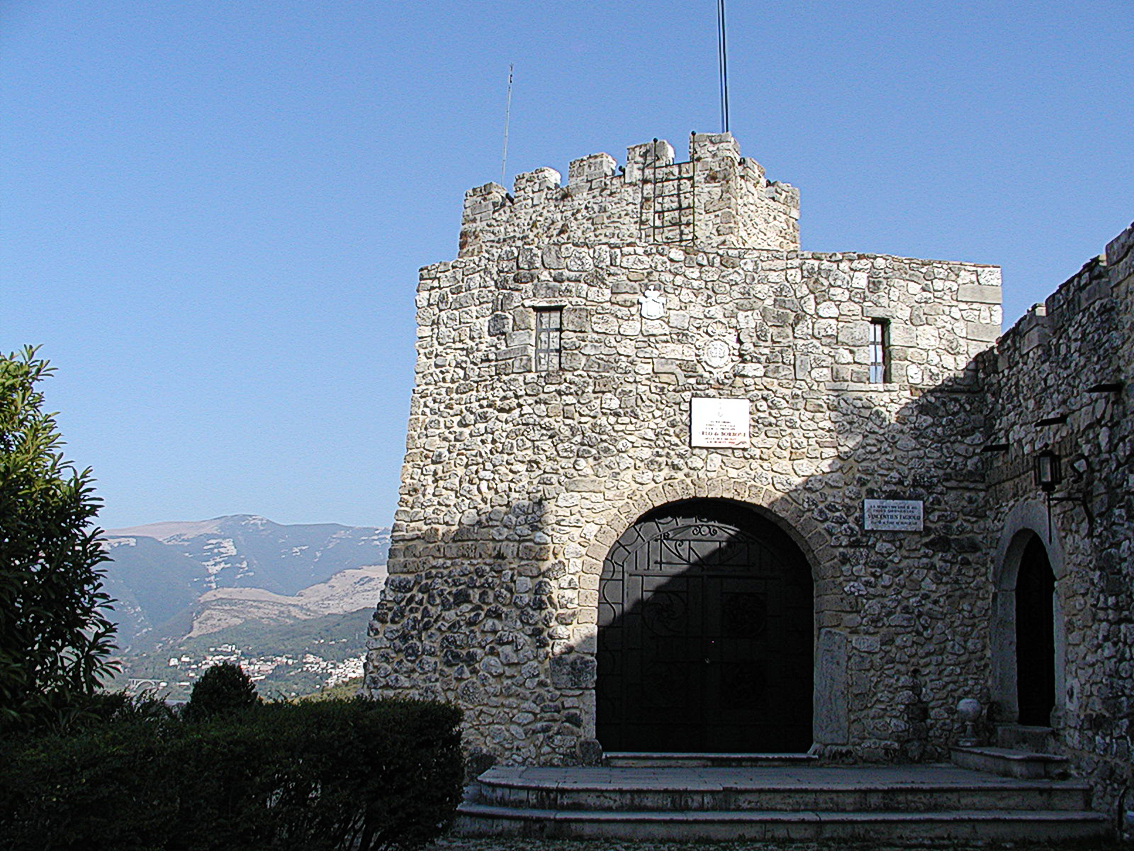 Castello Genova di Salle